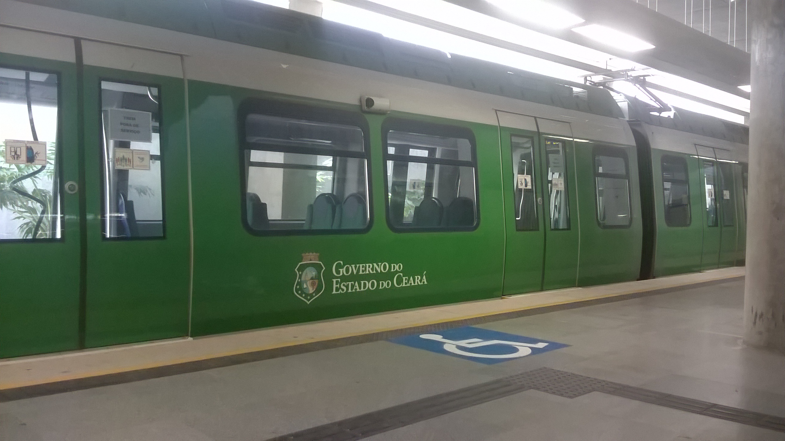 TUE (Trem unidade elétrica), na plataforma da estação Central-Chico da Silva